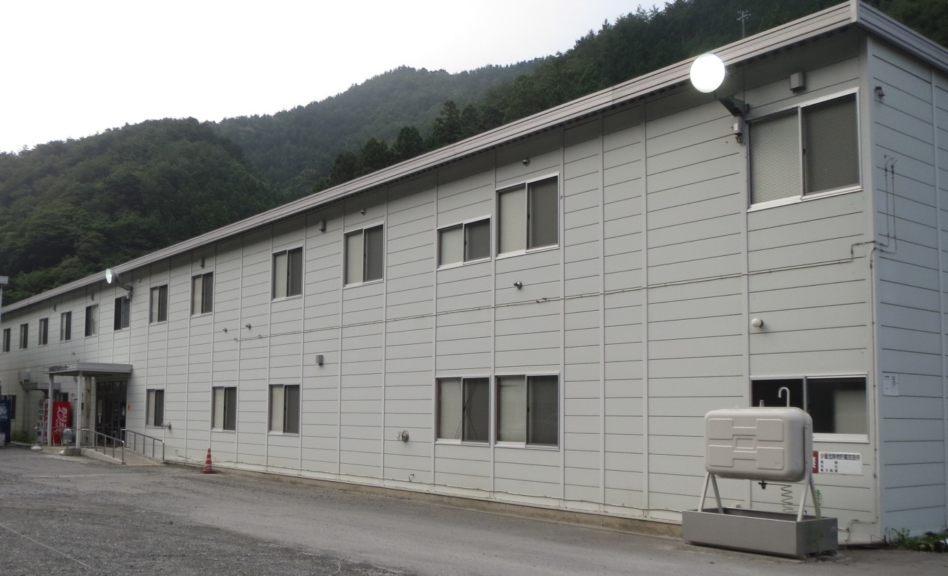 岩手県釜石警察署に隣接する沿岸運転免許センター